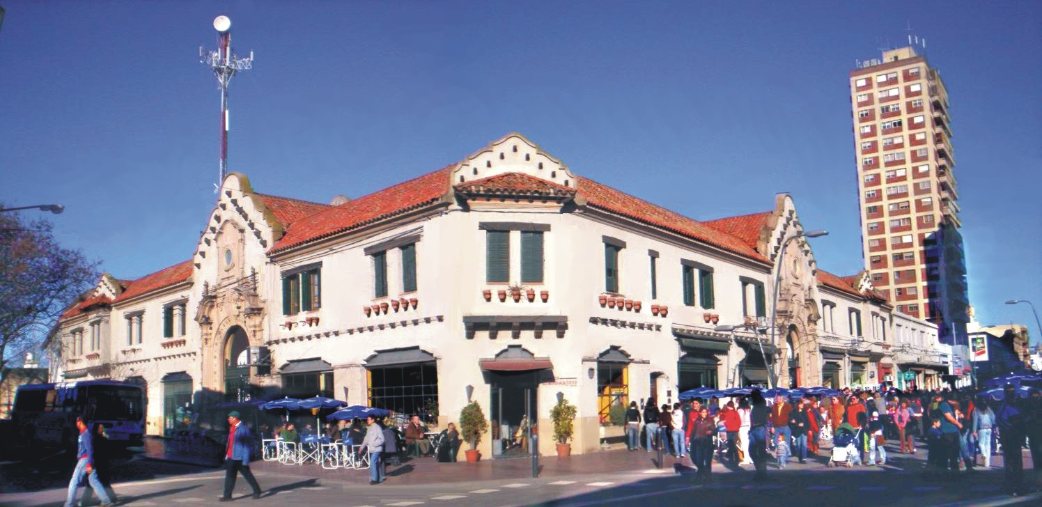 Museo Municipal de Arte "Ángel María de Rosa", conocido como "MUMA", en Junín, Argentina.